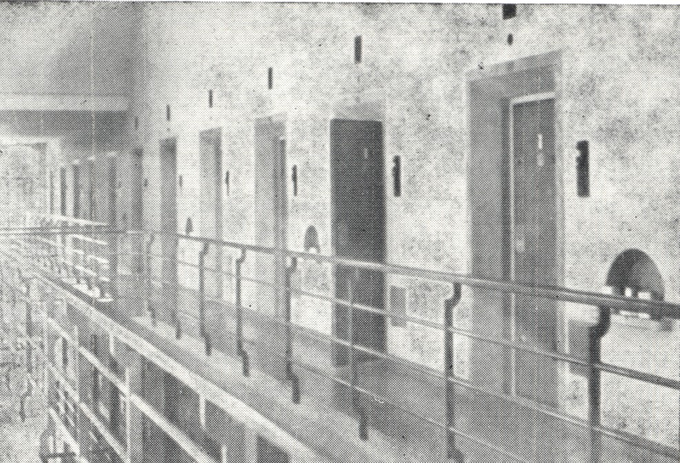 Riihimäen vankila vuonna 1944, päiväselliosasto.